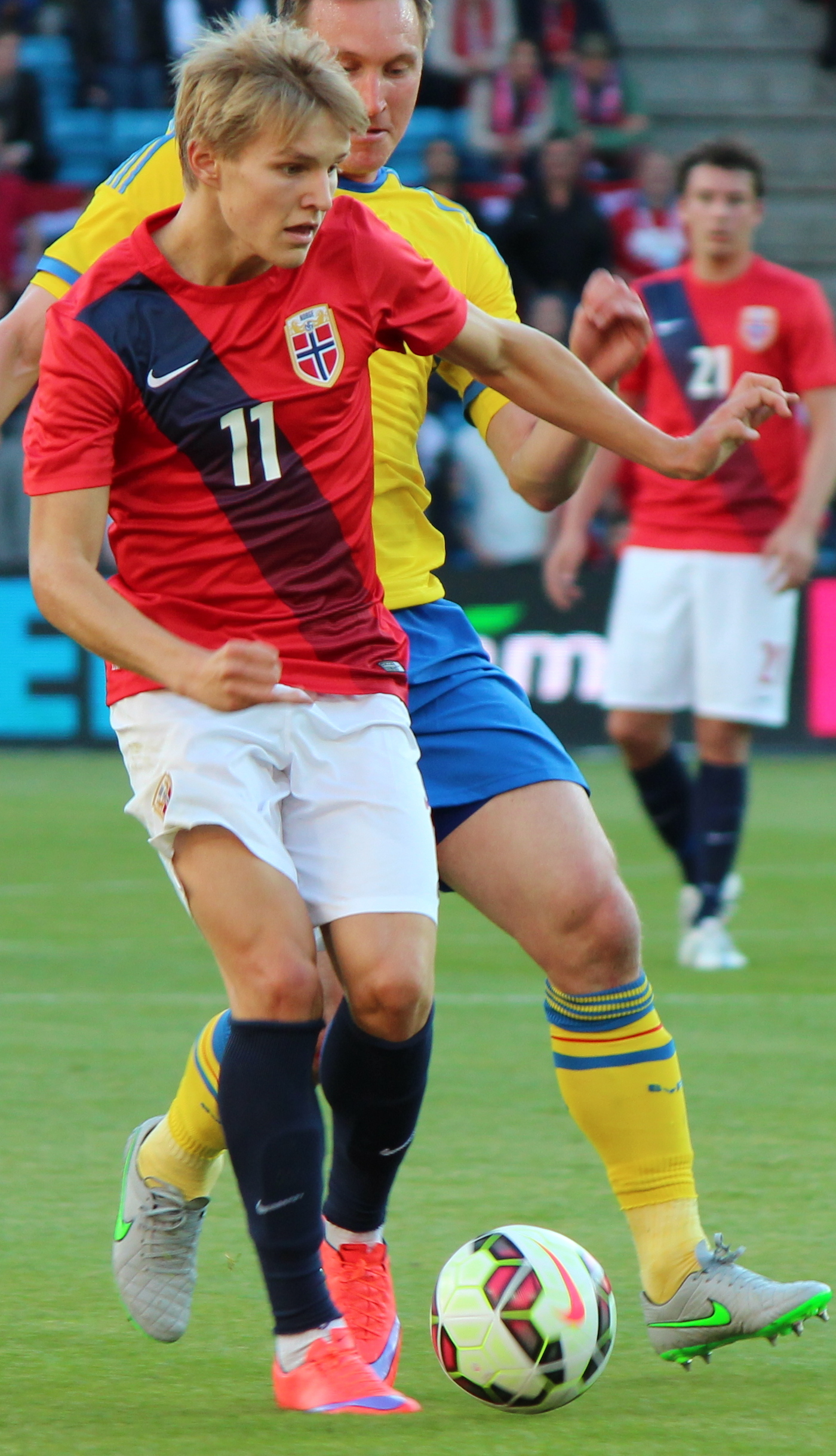 Martin Ødegaard spilte 90 minutter da Norge-Sverige møttes til dyst i privatlandskamp på Ullevaal stadion 8. juni. Kampen endte 0-0.